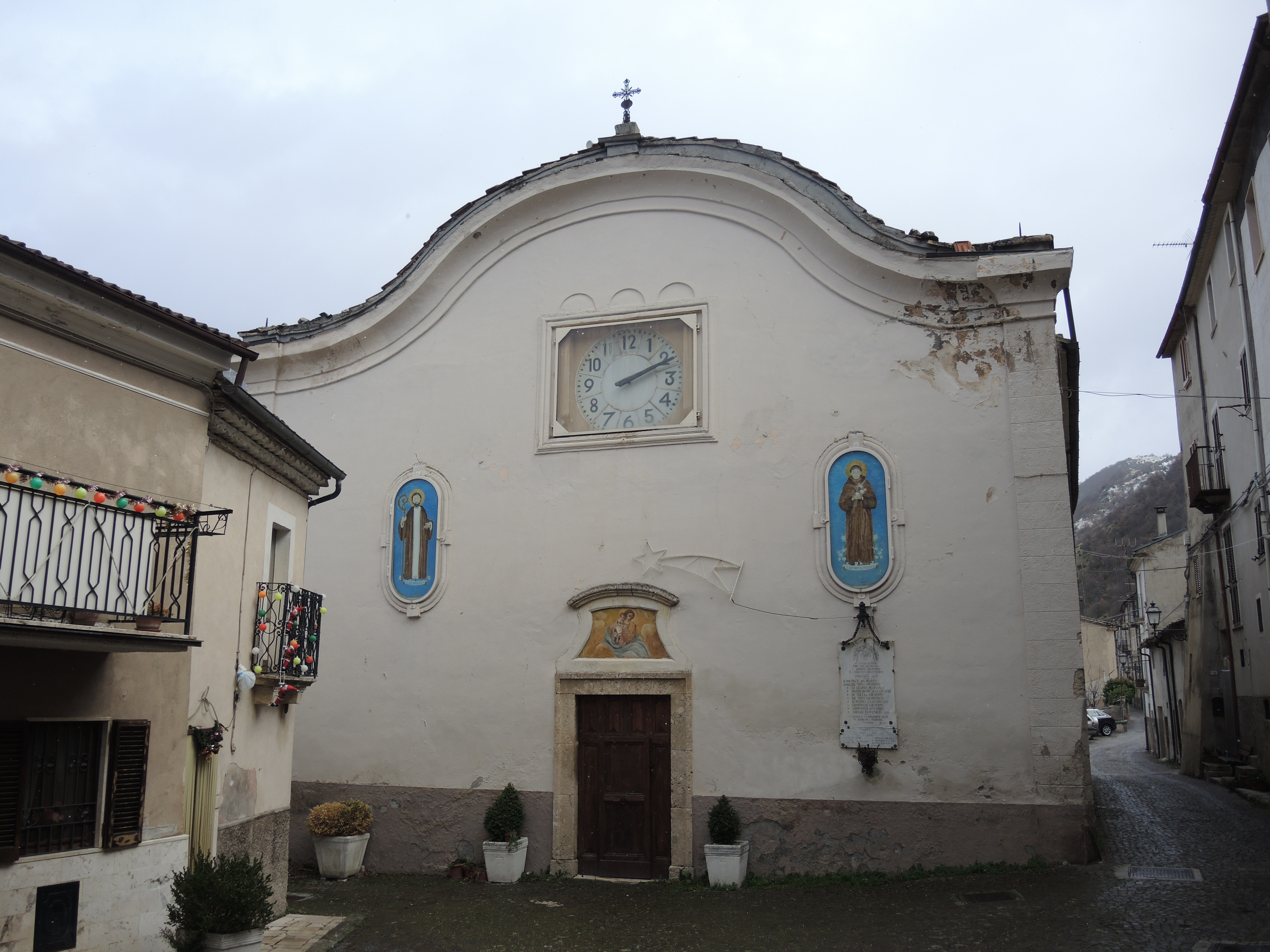 Castrovalva